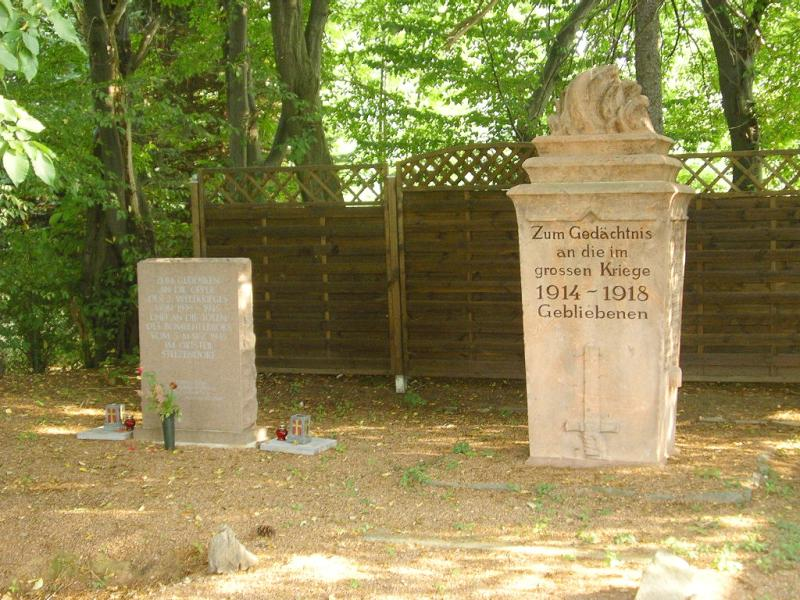 Mahnmal gegen Krieg und Völkerhass an der Jagdschänkenstraße im Stadtteil Stelzendorf der Stadt Chemnitz